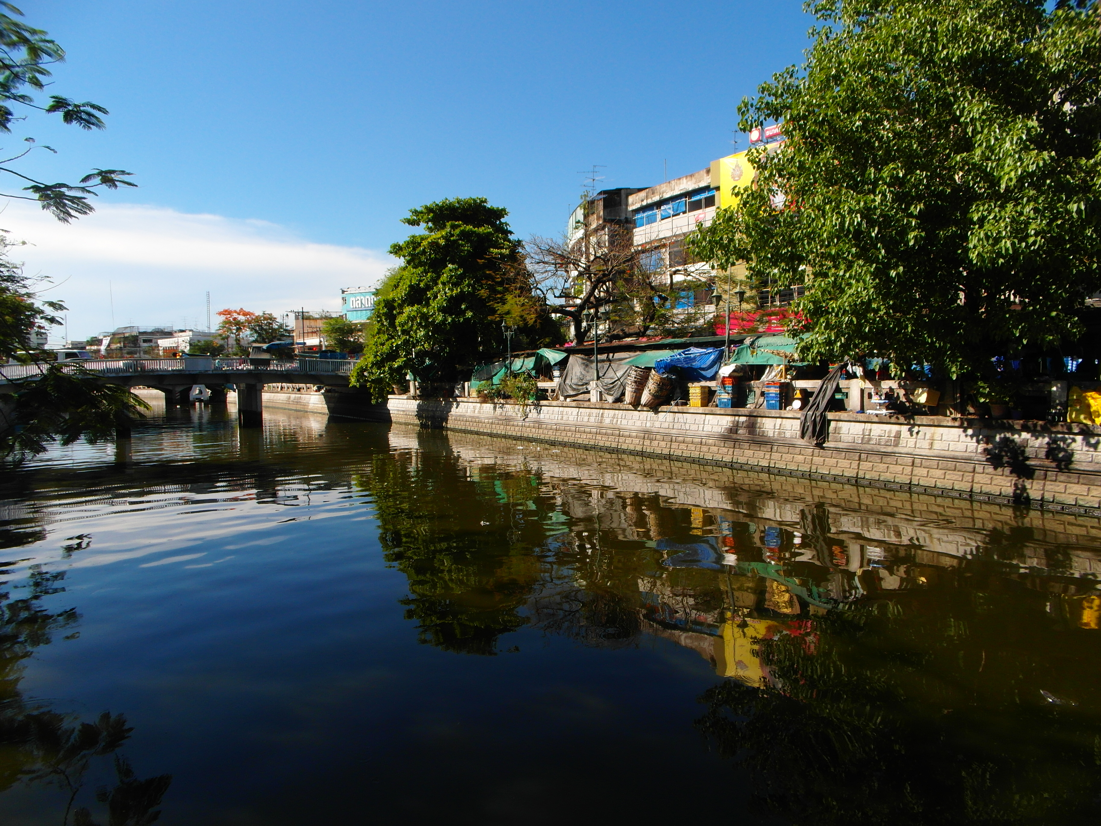 Bangkok 2013 april